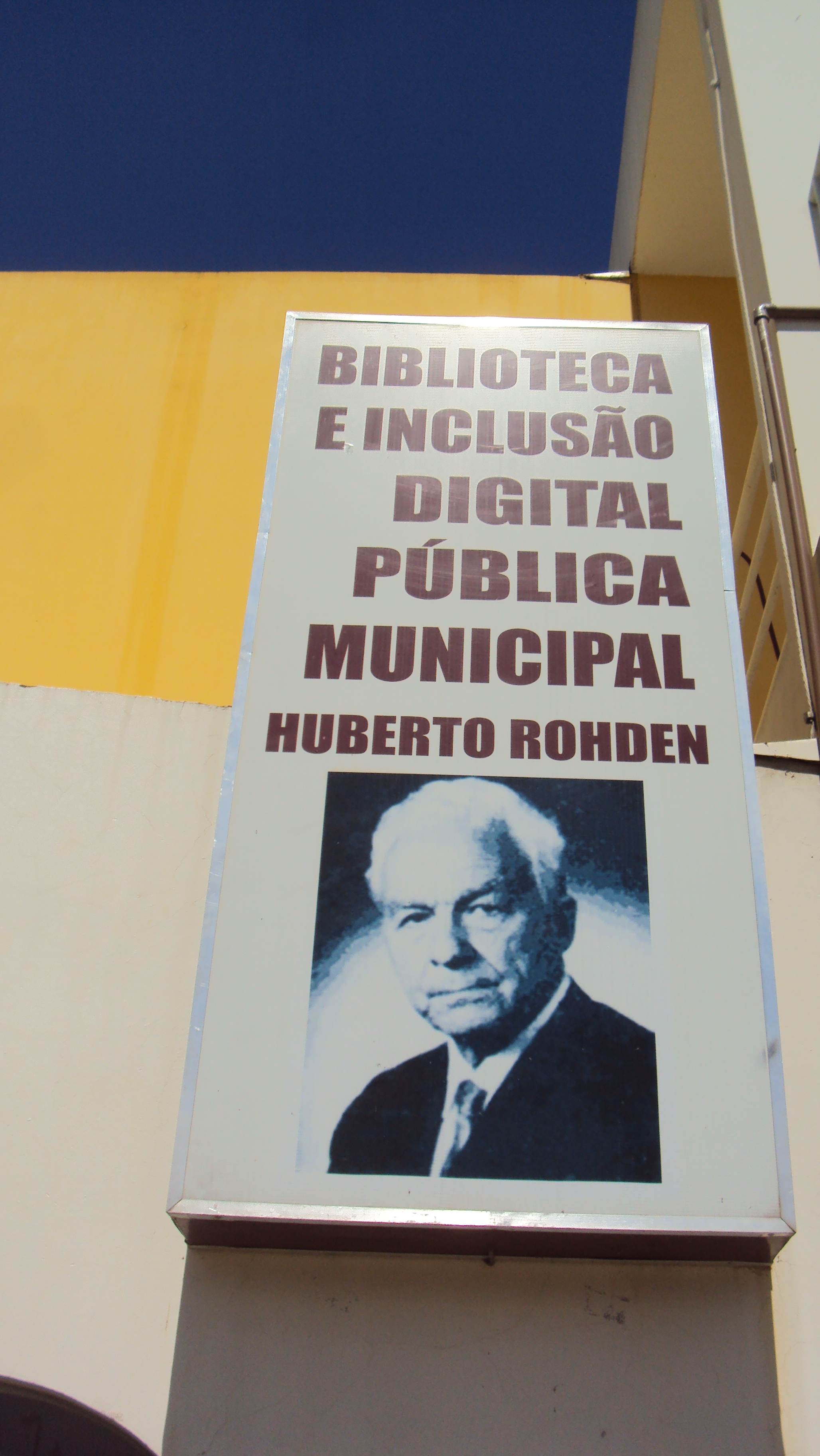 Identificação da Biblioteca e Inclusão Digital Pública Municipal Huberto Rohden, São Ludgero, santa Catarina